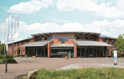 Verwaltungsgebäude Stadtwerke Ahaus GmbH, Hoher Weg 2 in Ahaus, Frontansicht